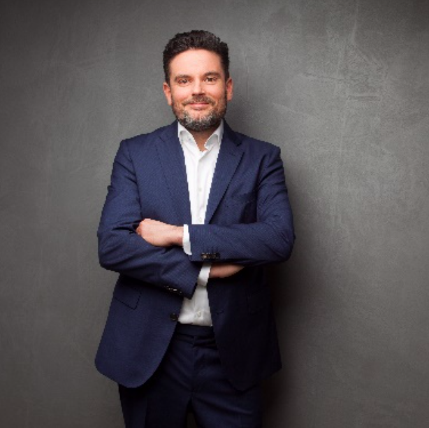 Michael Bruse (2018)